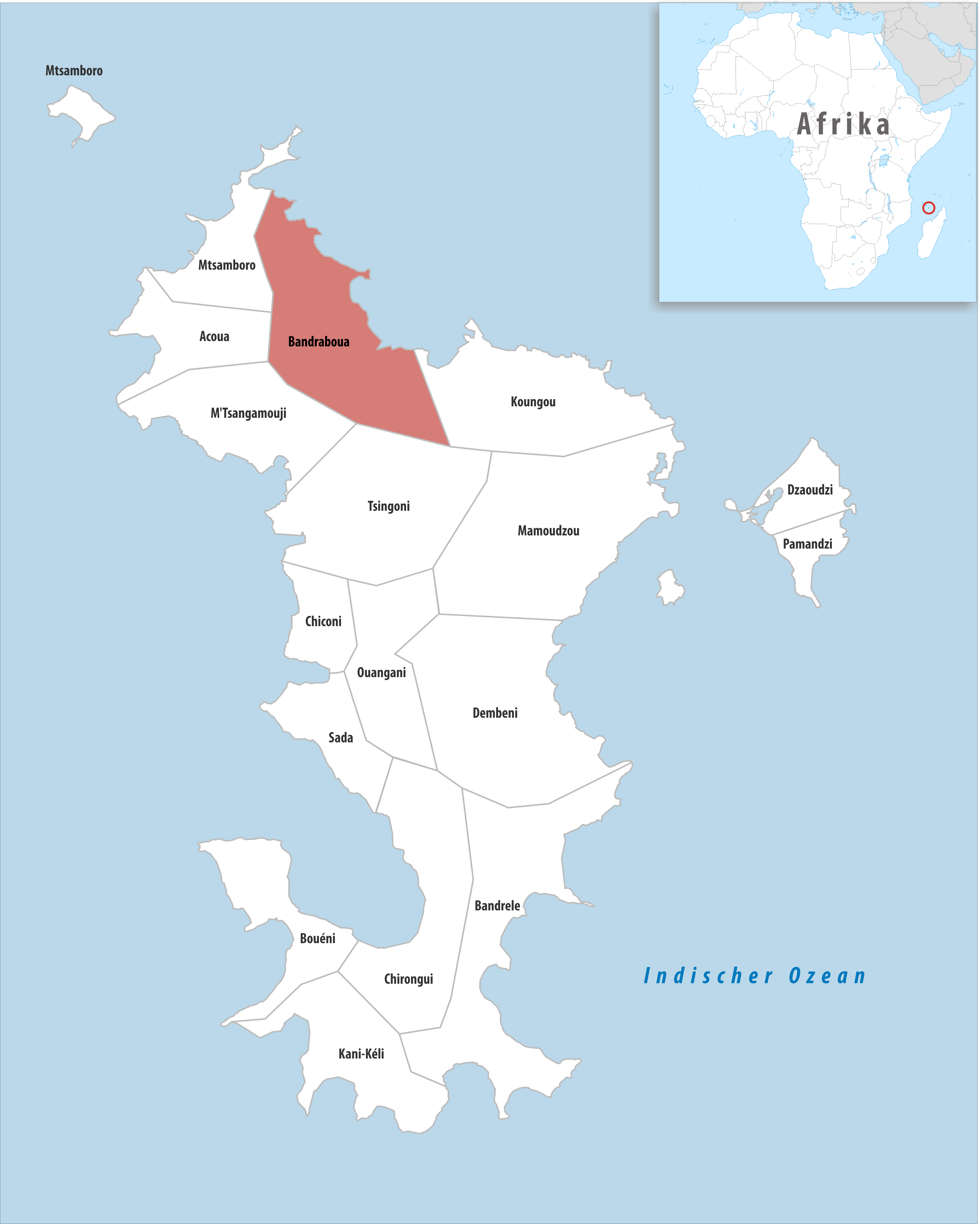 Lage der Gemeinde Bandraboua